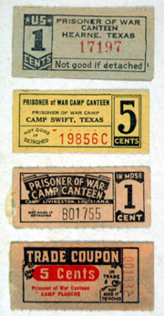 Buoni elargiti per il pagamento del lavoro effettuato durante la detenzione nei campi di prigionia americani durante la seconda guerra mondiale